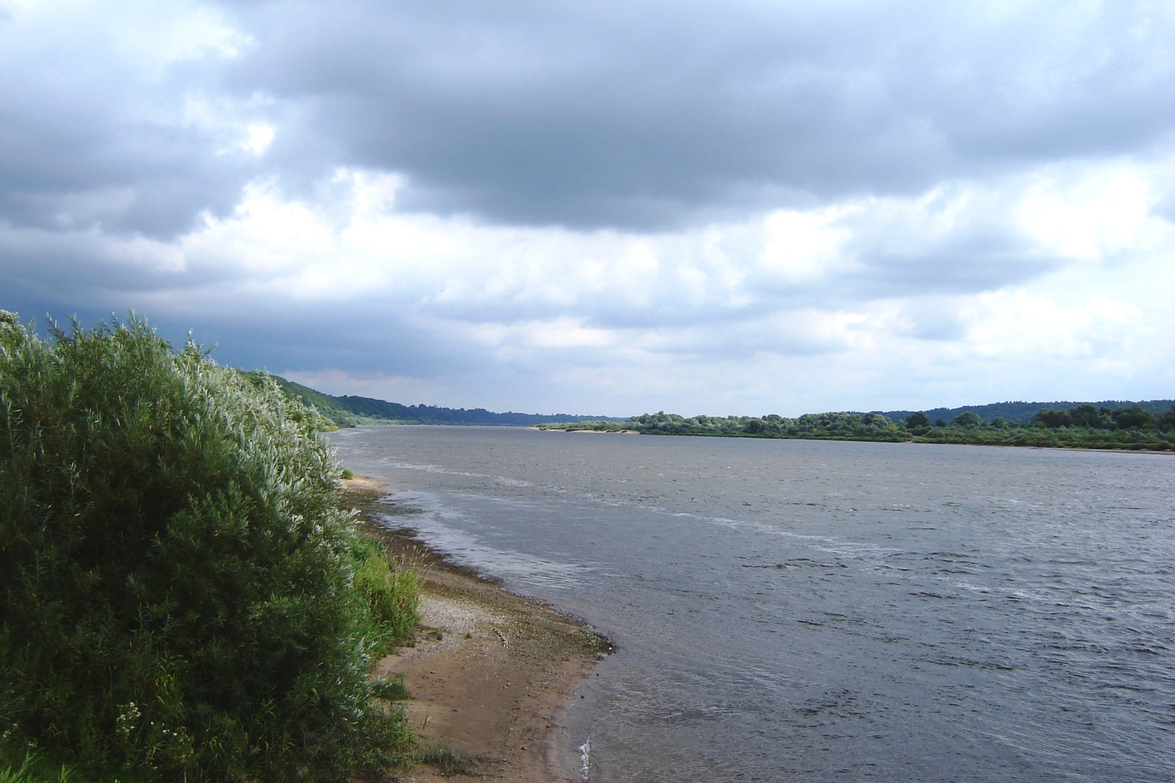 Der Memelfluss bei Jurbarkas/Georgenburg in Litauen